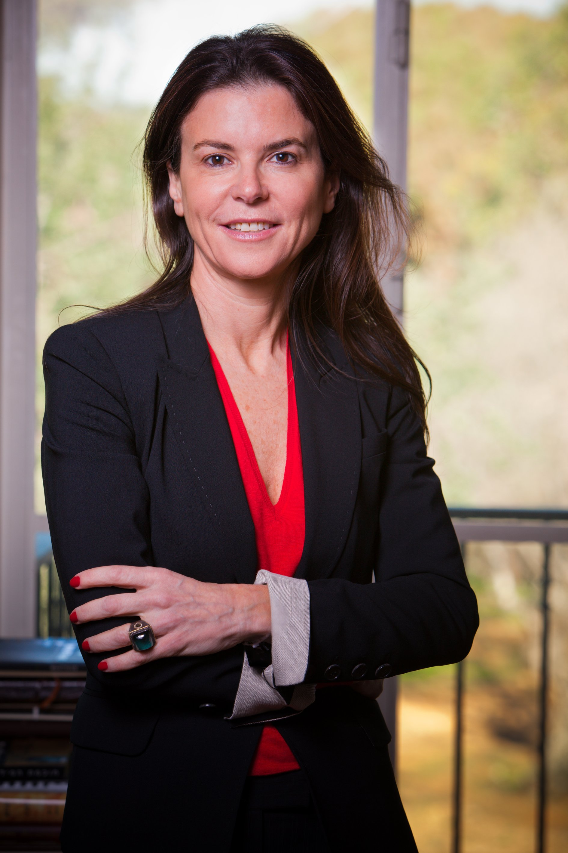 עפרה שטראוס היא יו"ר קבוצת שטראוס.